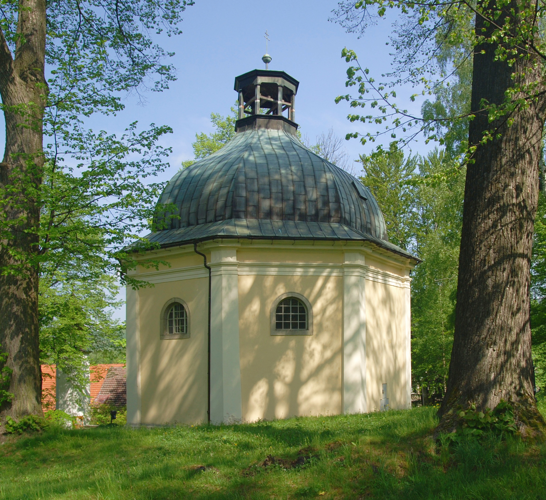 miasto Lądek Zdrój